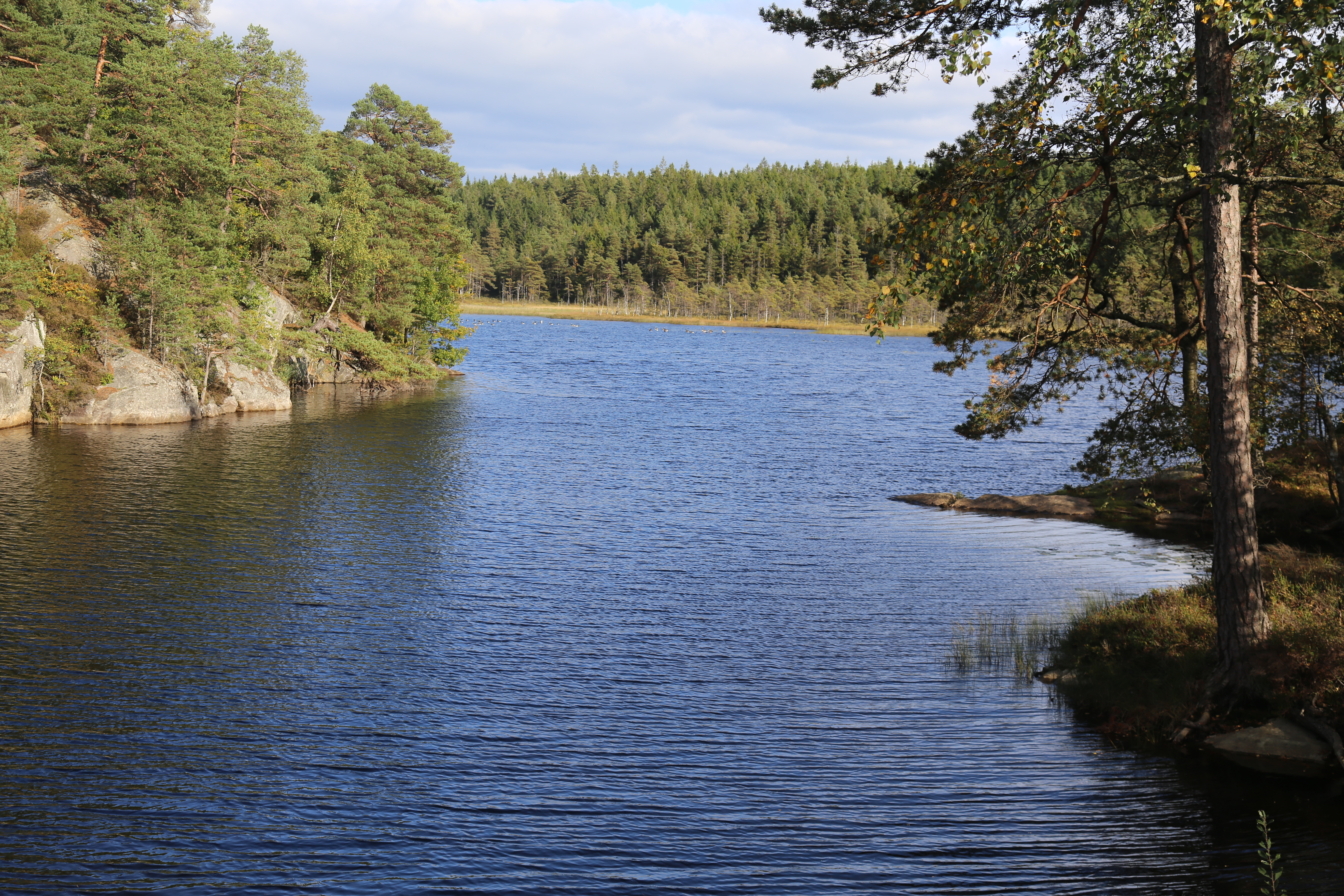 Stendammen i Lilla Edets kommun. Fotot är taget från rastplatsen mellan Kroksjön och Stendammen.